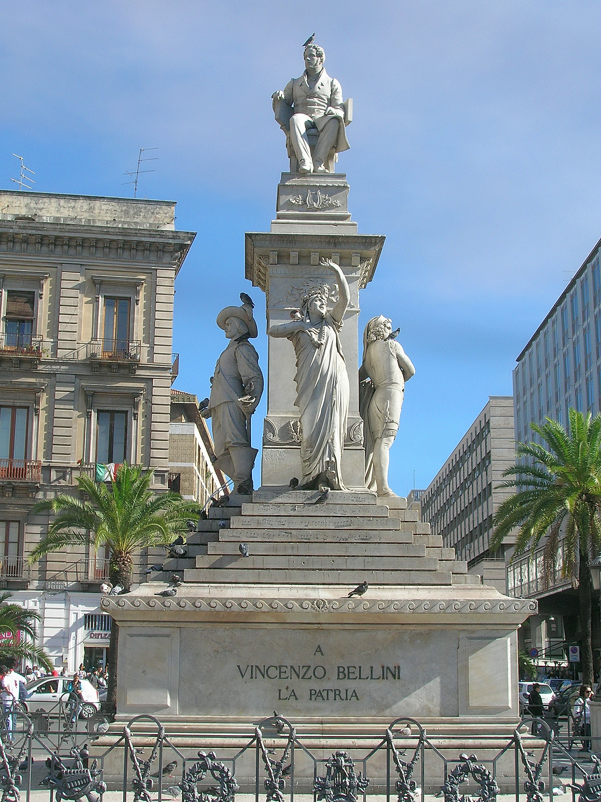 Manumento a Vincenzo Bellini di Giulio Monteverde, in Piazza Stesicoro a Catania.